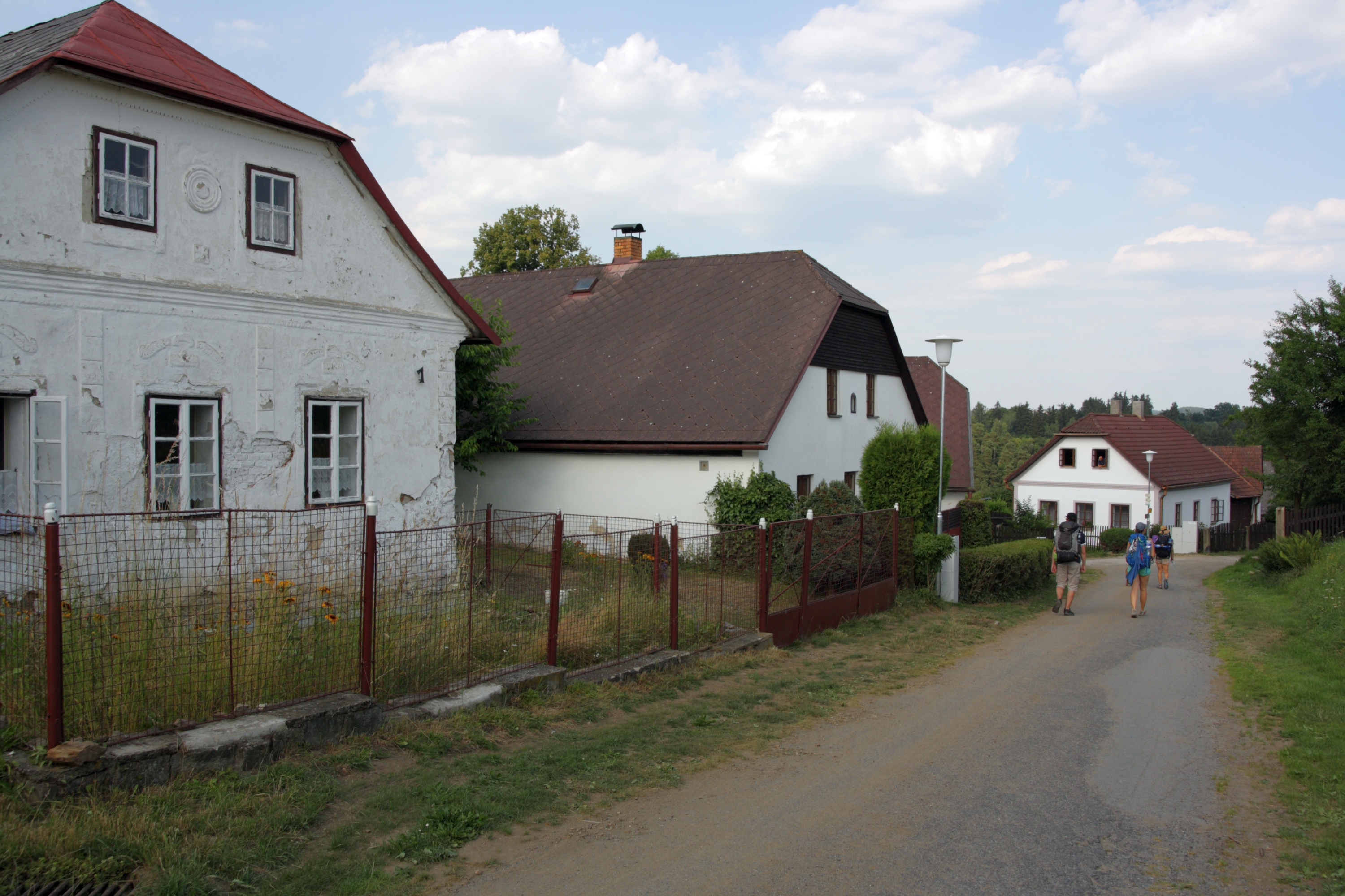 Petrovice (Puklice) - západní okraj vsi.